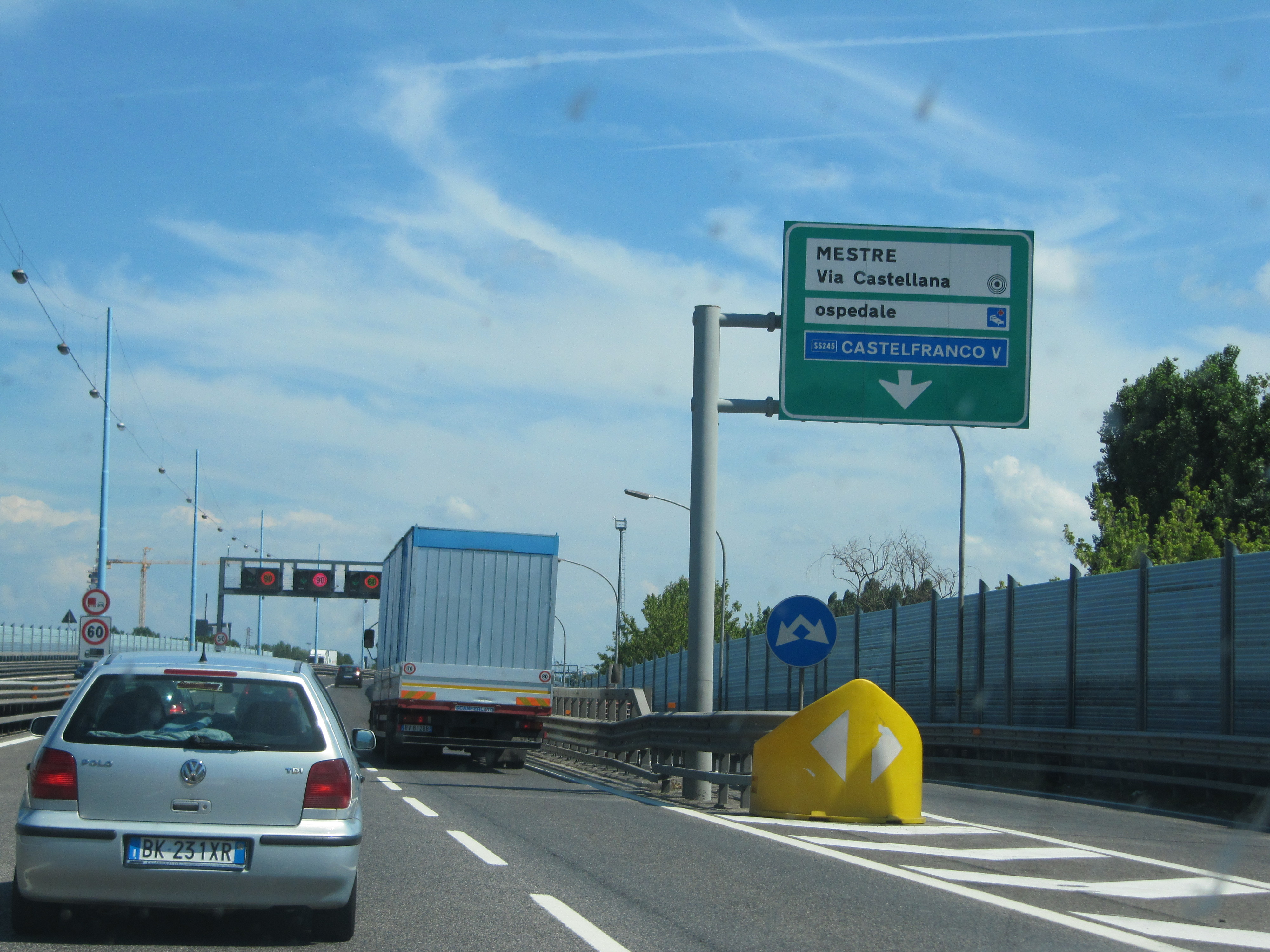 A57 2